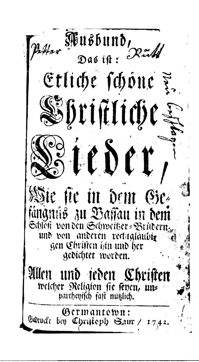 de: Dies ist ein Scan des historischen Buches: en: This is a scan of the historical document: Title: Ausbund Das ist Etliche schoene Christliche Lieder, Wie sie in dem Gefaenfnues zu Bassau in dem Schloß von den Schweitzer-Brüdern und von anderen rechtglaeubigen Christen hin und her gedichtet worden.